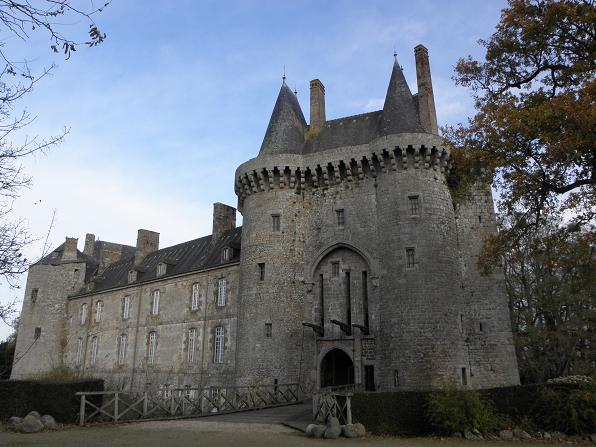 Château de Montmuran aux Iffs (35)